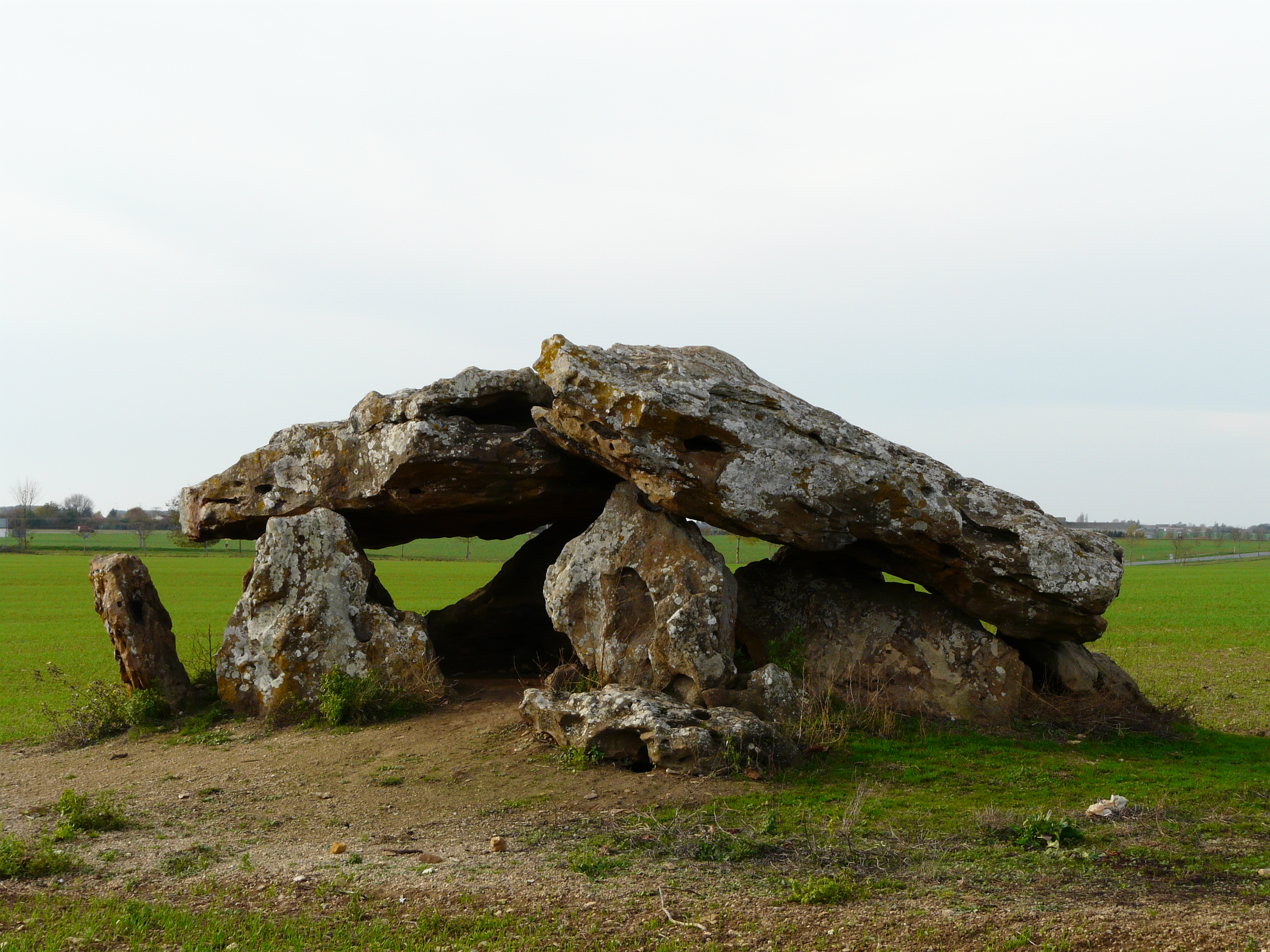 Dolmen la Pierre-Levée, Neuville-de-Poitou, Vienne, France